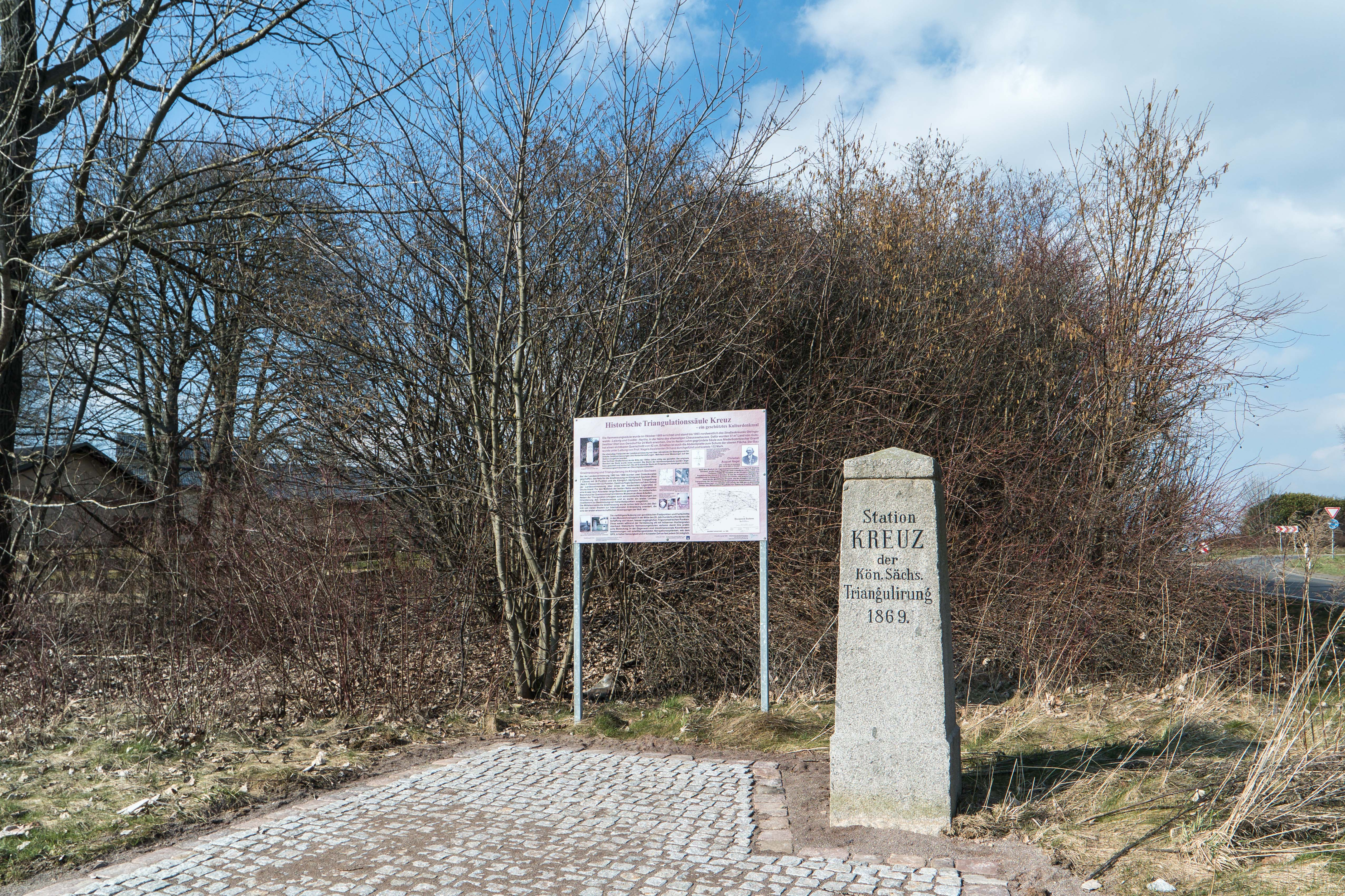 Triangulationssäule Kreuz Station 100 Vermessungspunkt II. Ordnung, Hartha Kreuz in Hartha Text: Station KREUZ der Kön.Sächs. Triangulirung 1869.